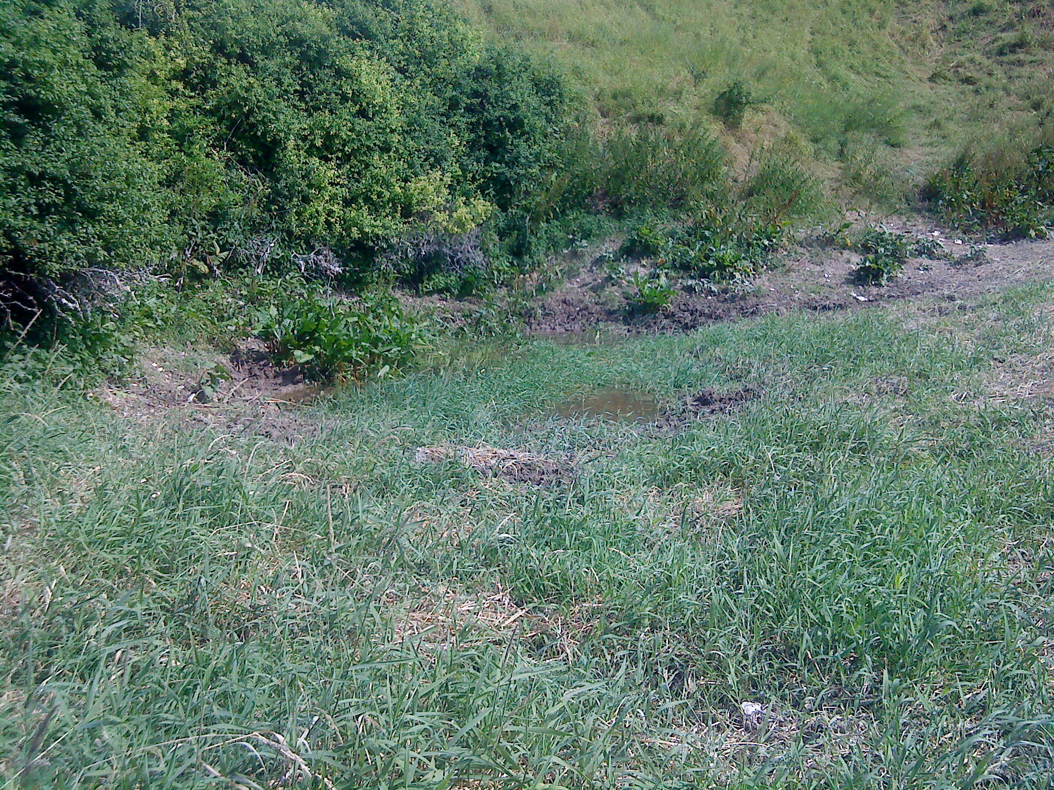 Die Wasseraustrittsstelle im Kirschensoog (trocken gefallen)